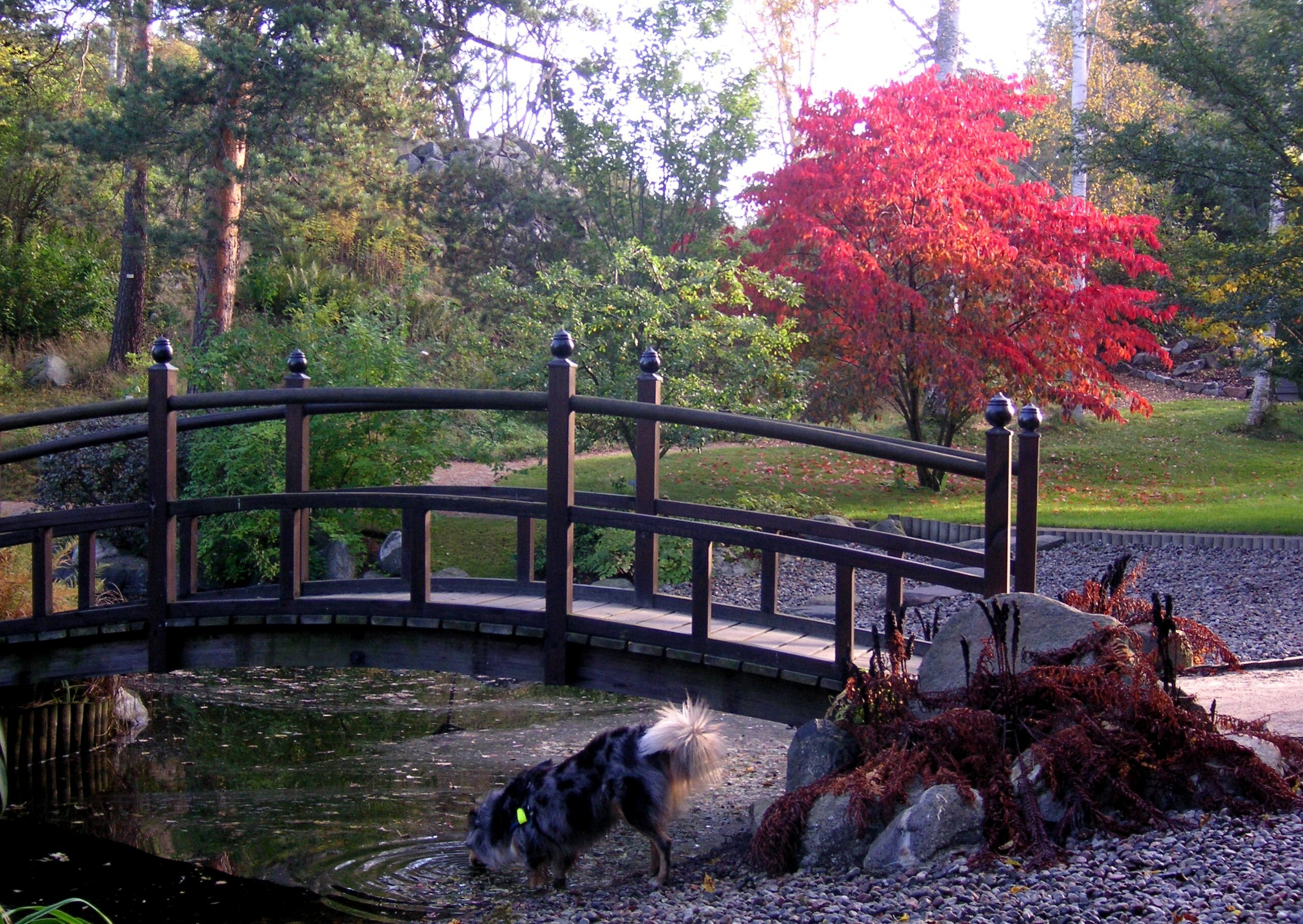 Bergianska botaniska trädgården i Stockholm